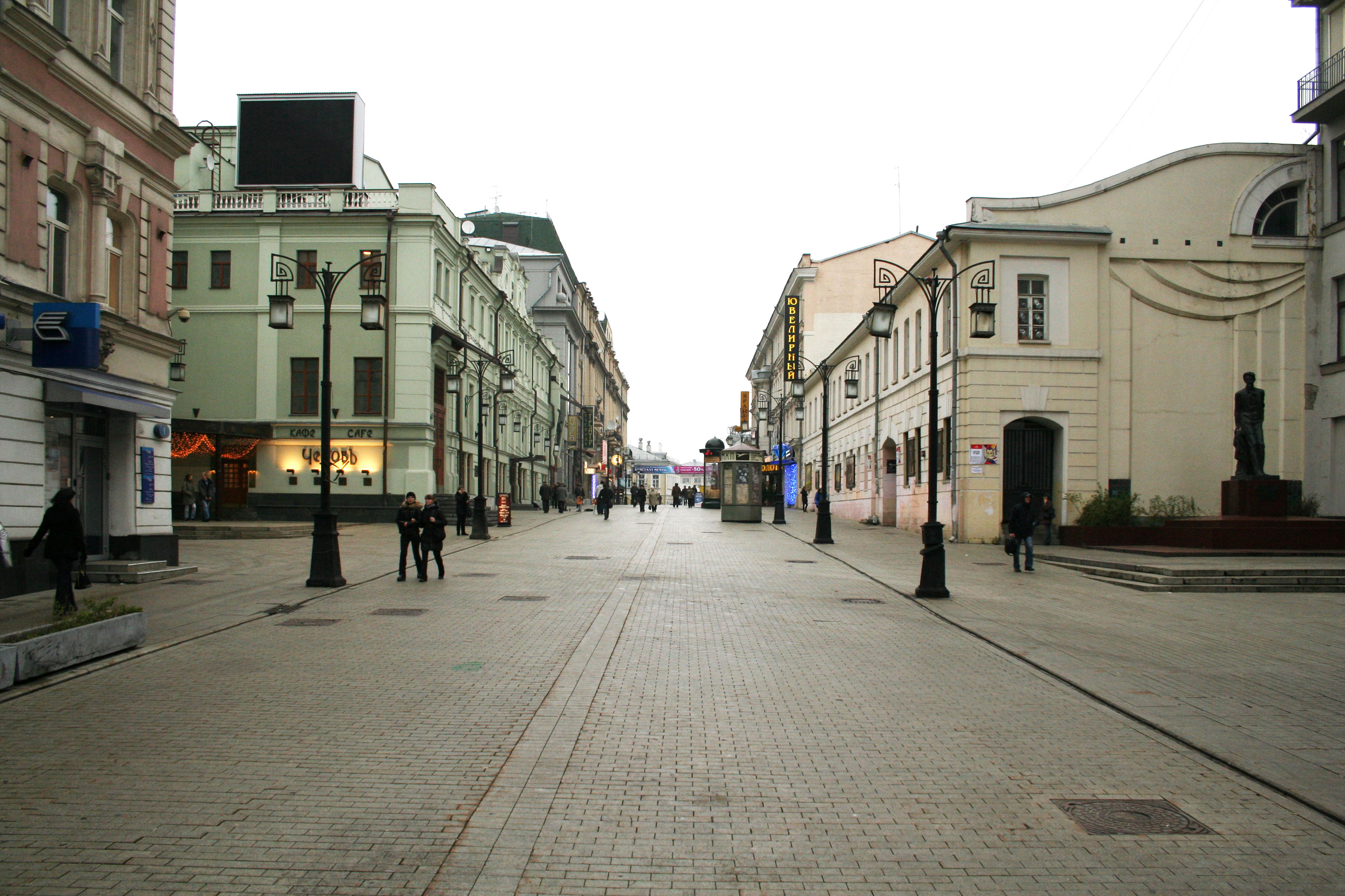 Камергерский переулок. Общий вид от Тверской улицы